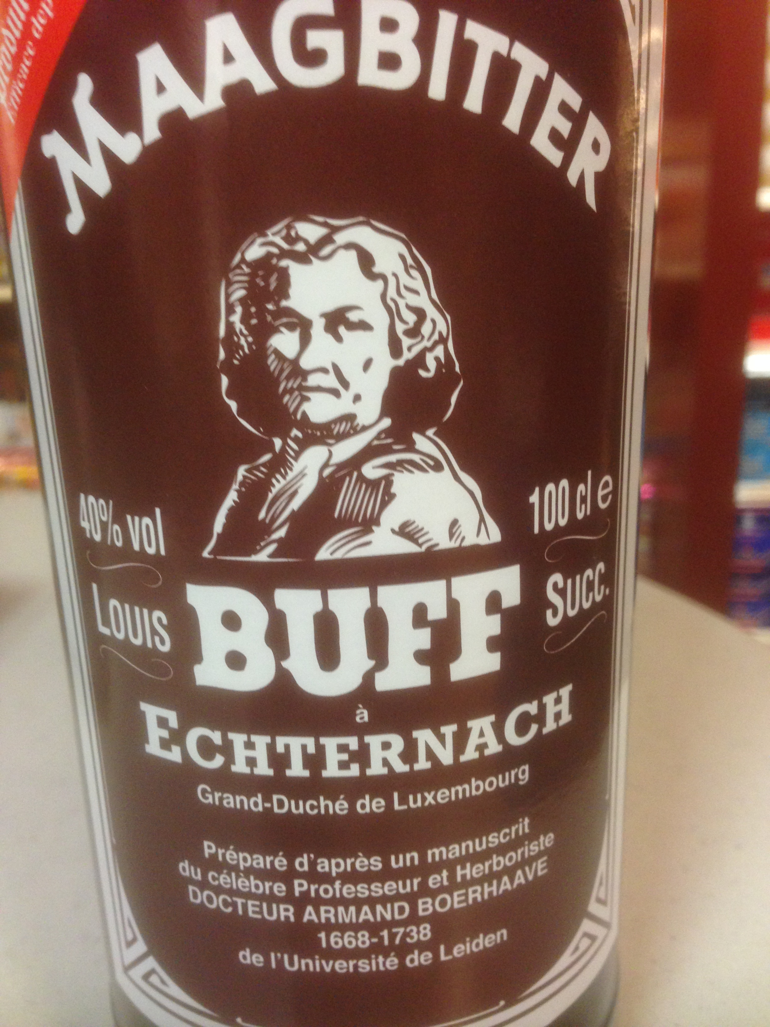 Luxemburgischer Magenbitter der Marke Buff